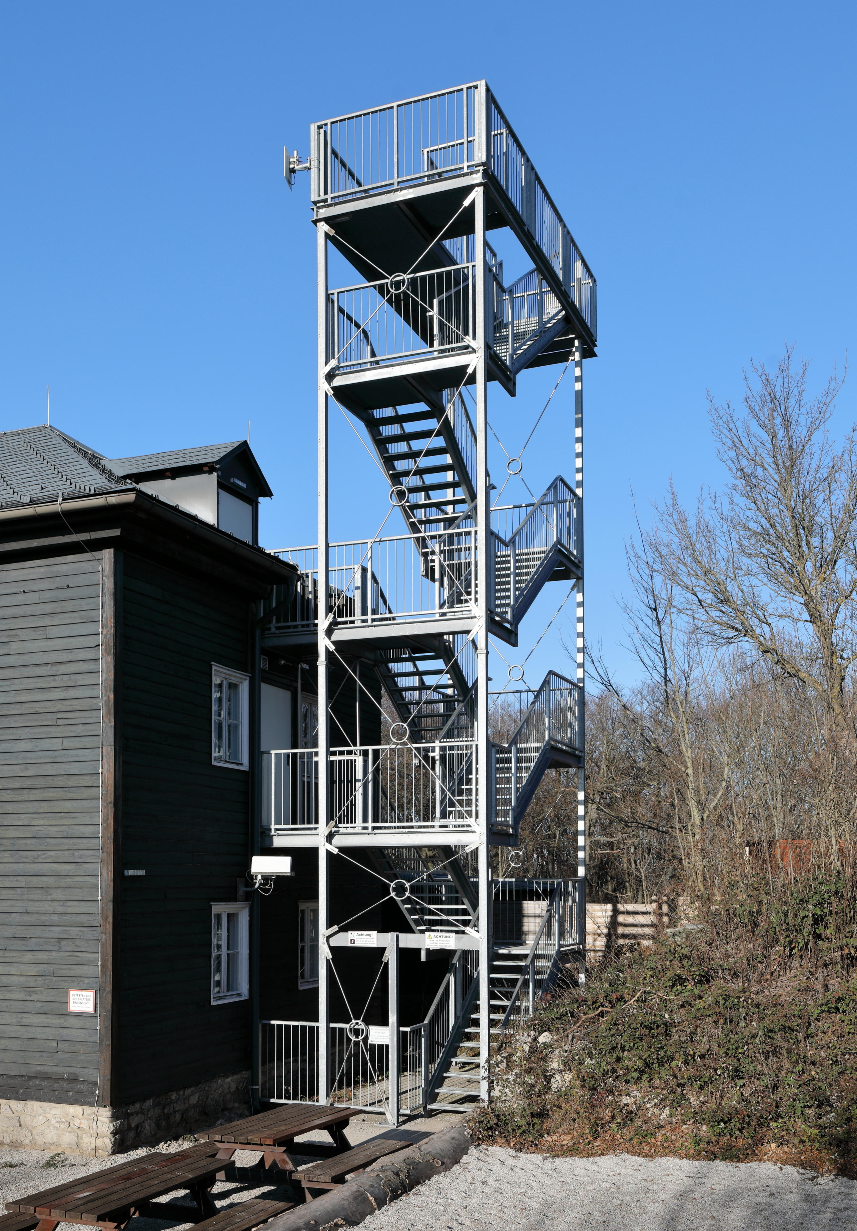 Aussichtsturm auf dem Gipfel des 716 m hohen Peilsteins.Der 12 m hohe Turm wurde 2013 direkt an der Ostseite des Peilsteinhauses errichtet und dient gleichzeitig als Fluchttreppe für das Ober- und Dachgeschoss des Hauses. Zuvor gab es auf dem Peilstein auch schon eine Peilstein-Warte, die jedoch im Zuge des Zweiten Weltkrieges stark beschädigt wurde und daher 1947 vollständig abgetragen werden musste.